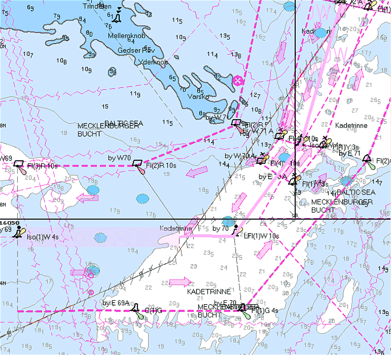 Screenshot Mecklenburger Bucht, Kadetrinne